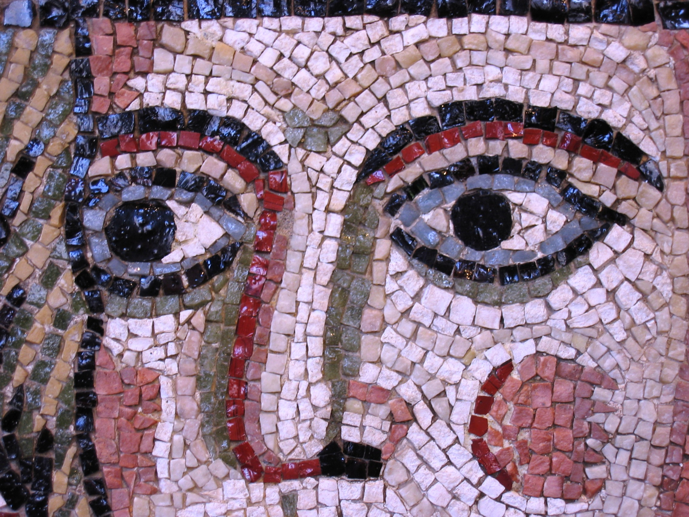 Ecclesia romana (particolare), XII sec. d.C., mosaico policromo, dalla Basilica di San Pietro. Museo Barracco, Roma (Italia)